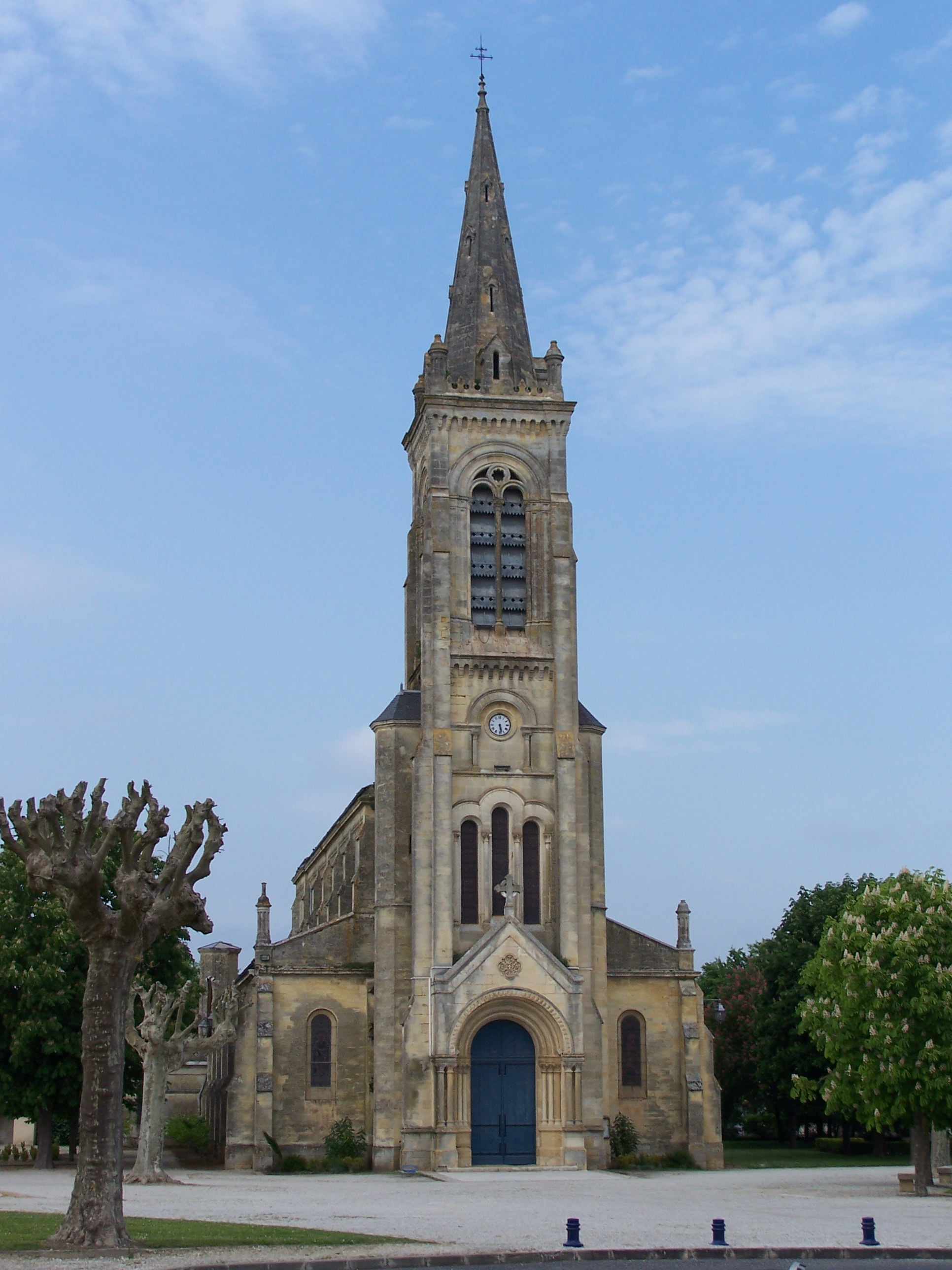 Église de Portets, Gironde, France